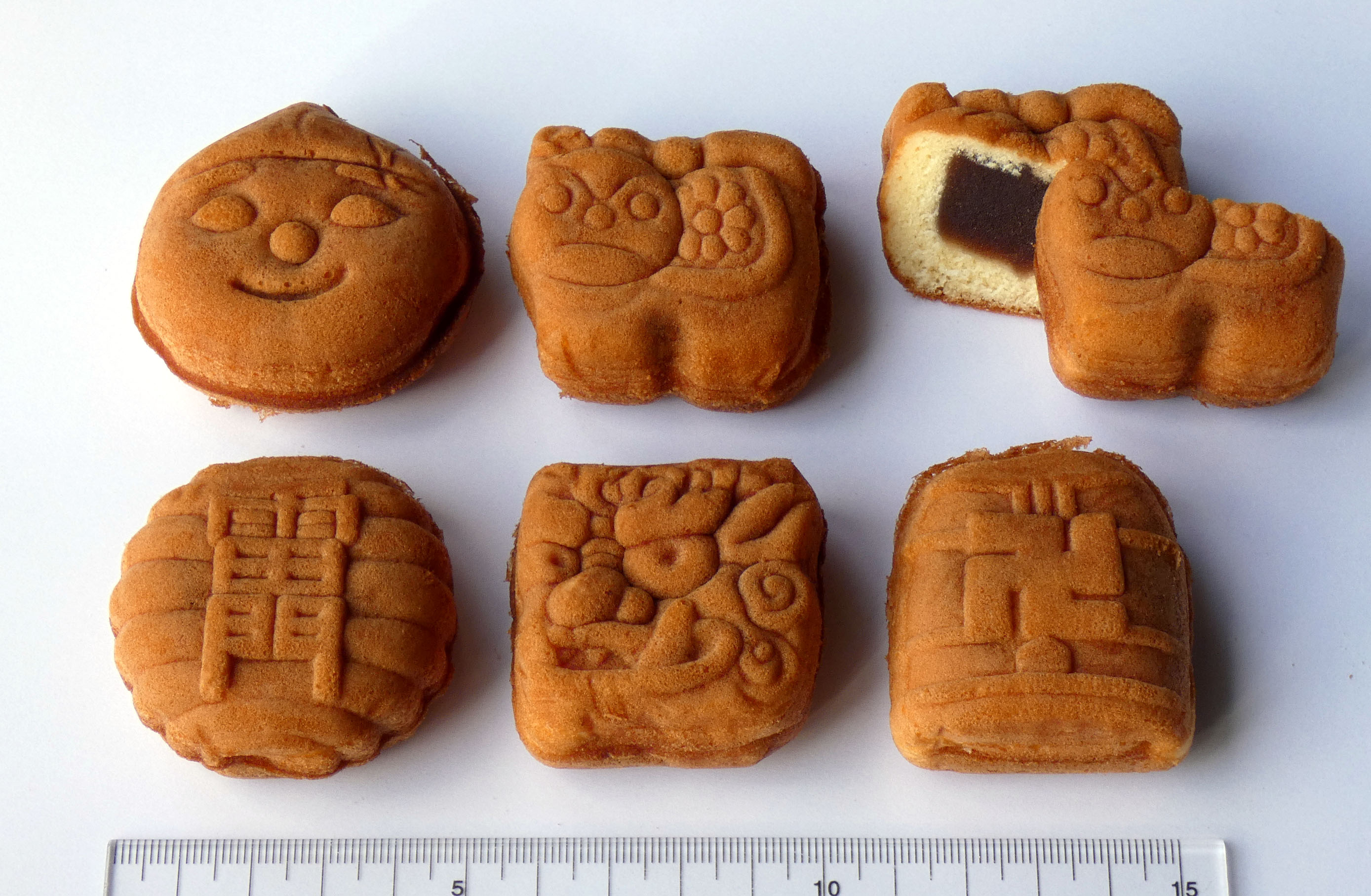 常盤堂雷おこし本舗 人形焼（1個 81円）